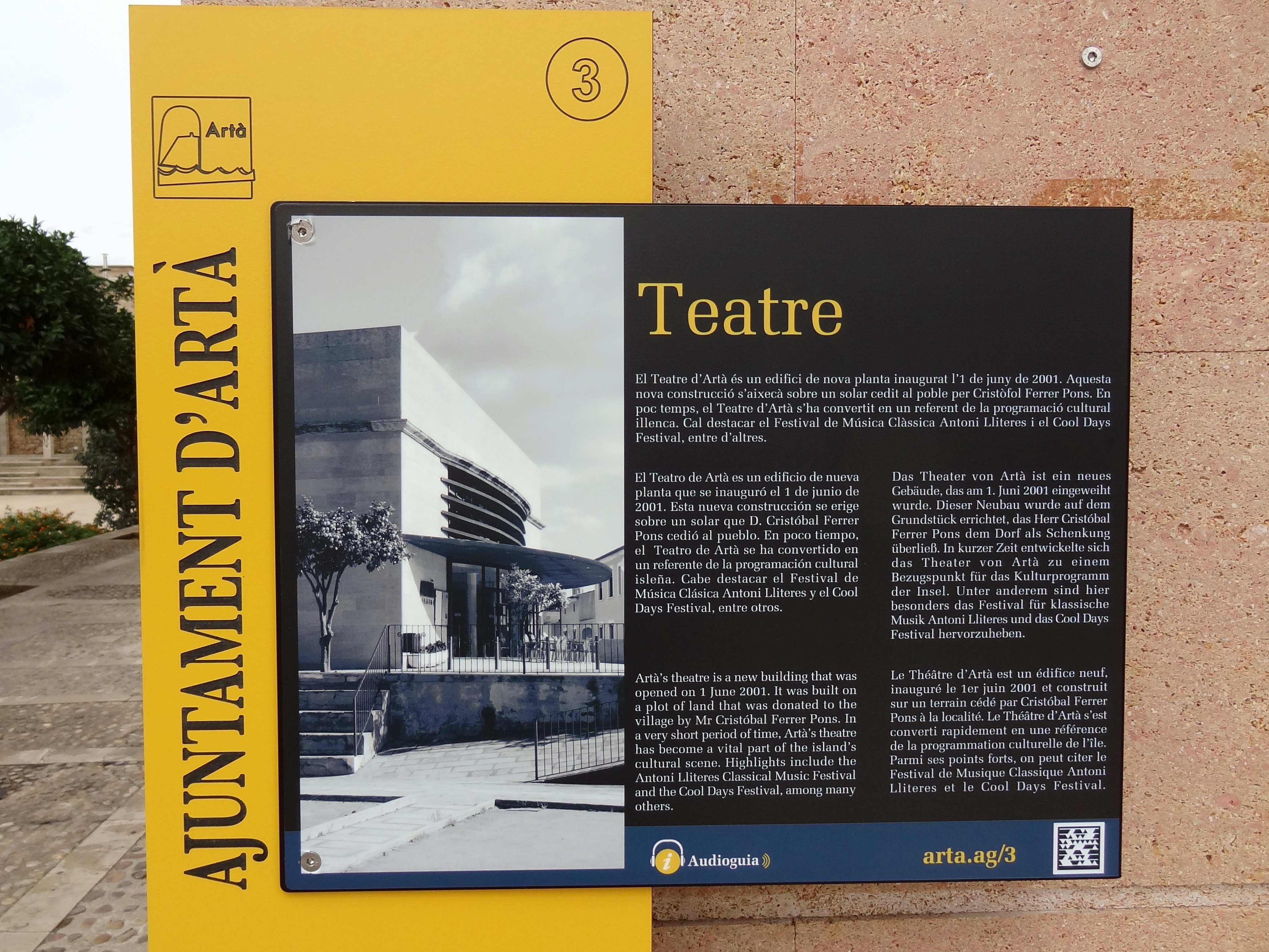 Informationstafel am Theater von Artà (Teatre d’Artà), Gemeinde Artà, Mallorca, Spanien